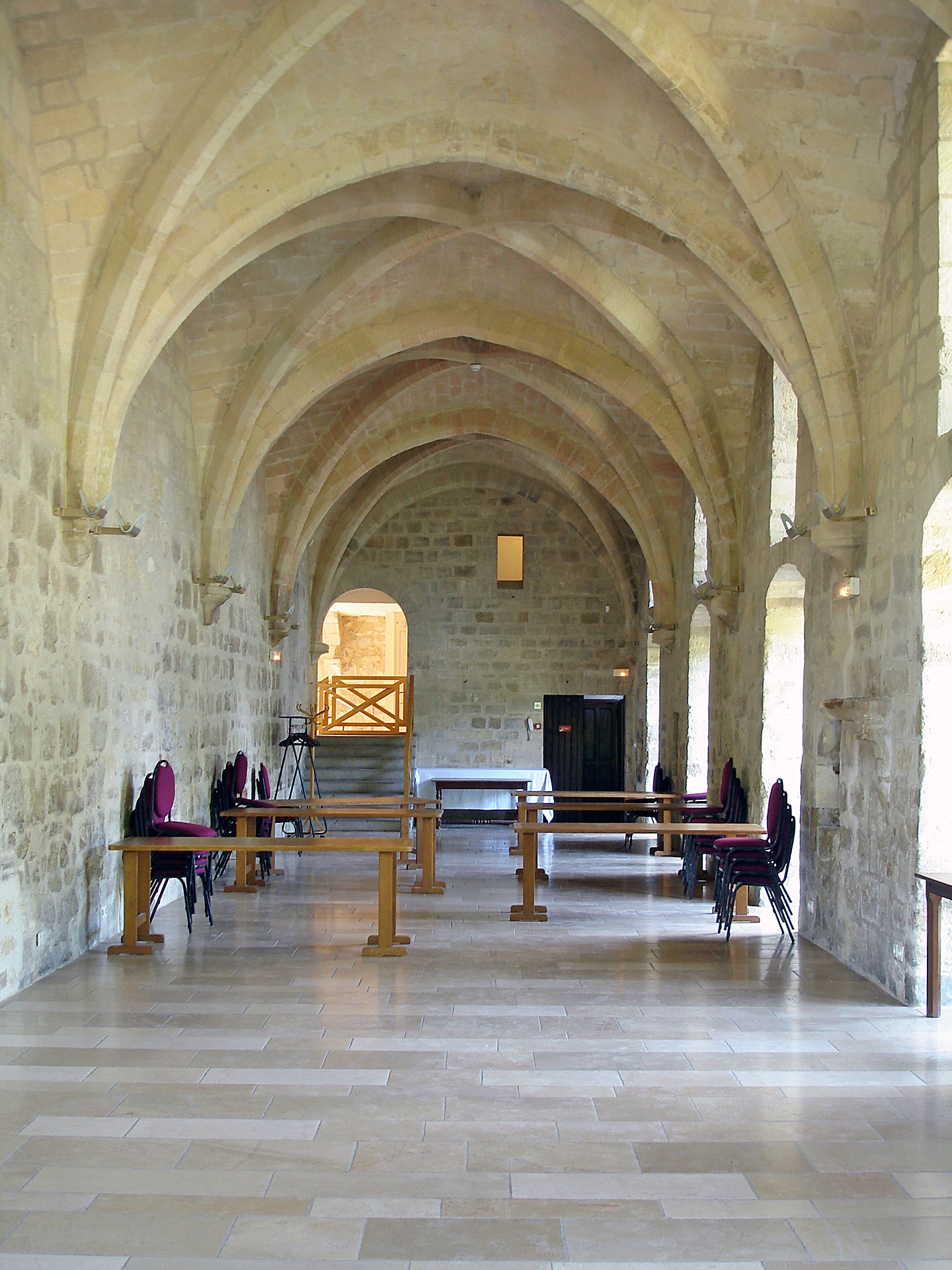 La galerie nord du bâtiment des latrines de l'abbaye de Royaumont, Val-d'Oise, France.